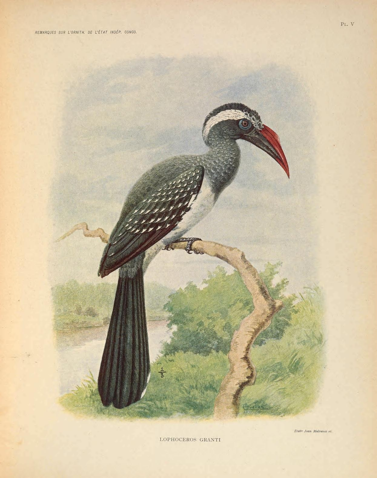 REMARQUES SUR L'ORNITH. DE L'ÉTAT INDÉP. CONGO. Pl. V ■§•..'? - "' v^' «^~-ti=^,'»' Établi Jean Malvauœ se. LOPHOCEROS GRANTI